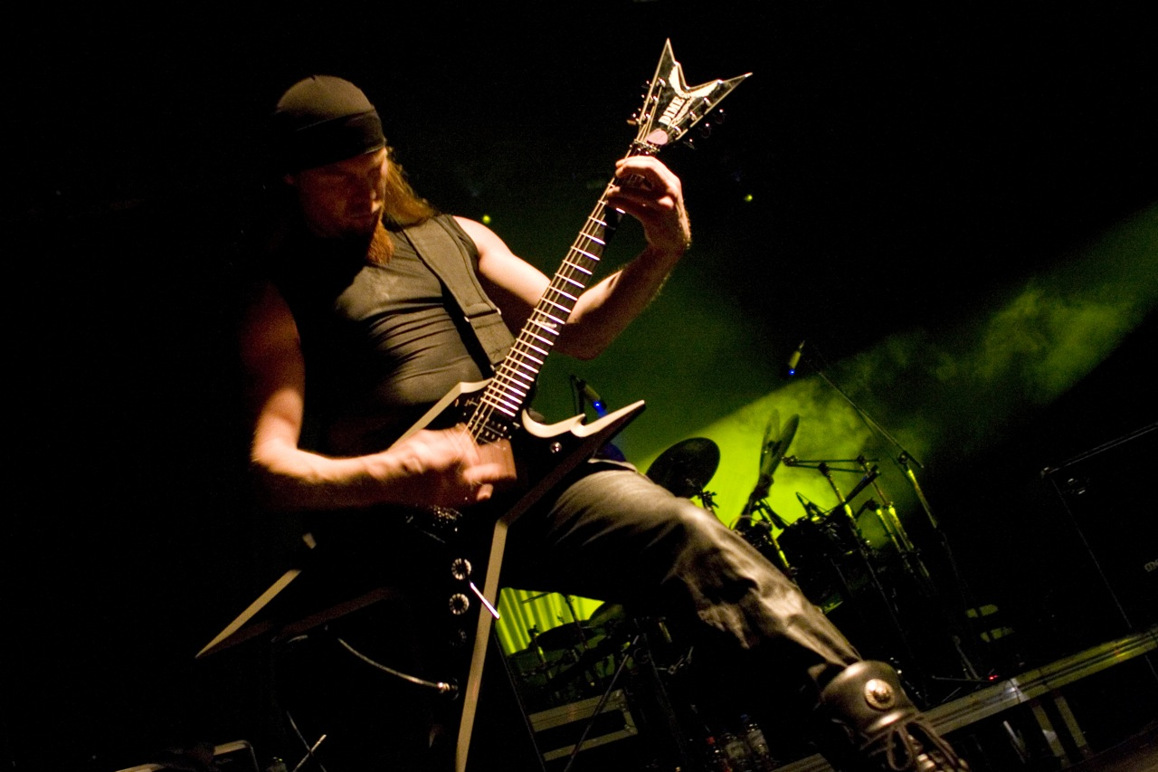 Thor Anders "Destructhor" Myhren of Morbid Angel Live @ Santana Hall - 08/03/2009 - São Paulo, Brasil É proibida a cópia ou reprodução deste material sem a autorização do autor. Por favor, não publique nada daqui sem o devido crédito. Fotógrafo: Alexandre Cardoso